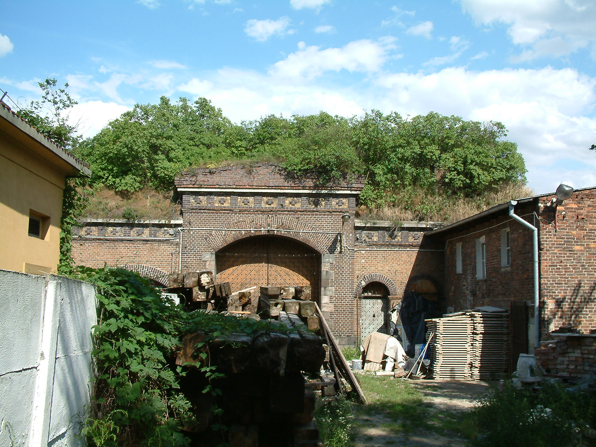 Remanents of Śluza Katedralna (Dom Schleuse) in Poznań